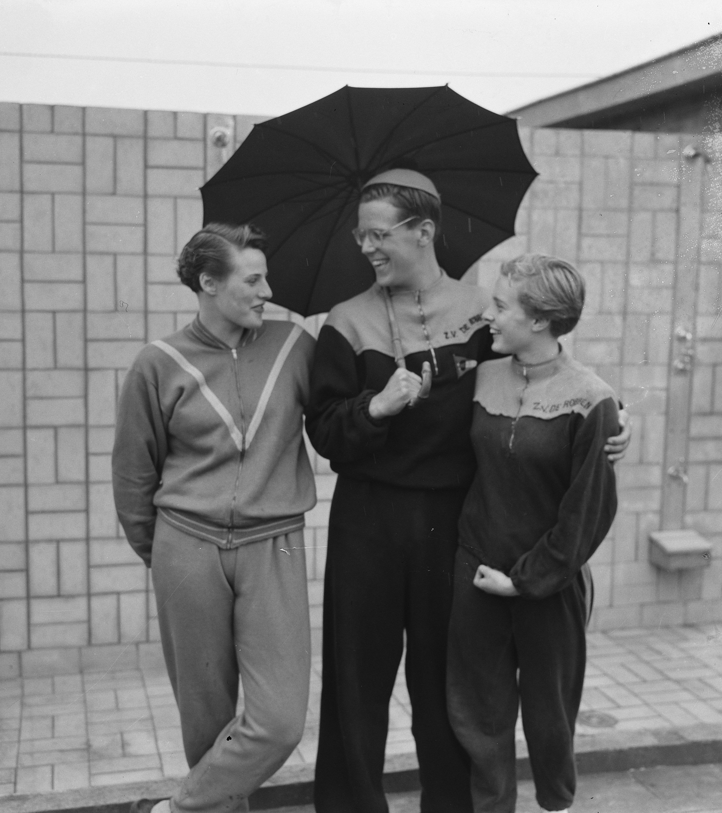 Collectie / Archief : Fotocollectie Anefo Reportage / Serie : [ onbekend ] Beschrijving : Nederlandse zwemkampioenschappen Enschede Geertje Wielema , Herman Willemse , Mary Kok Datum : 8 augustus 1954 Locatie : Enschede Trefwoorden : zwemkampioenschappen Persoonsnaam : Geertje Wielema, Herman Willemse, Kok, Mary Fotograaf : Noske, J.D. / Anefo Auteursrechthebbende : Nationaal Archief Materiaalsoort : Negatief (zwart/wit) Nummer archiefinventaris : bekijk toegang 2.24.01.04 Bestanddeelnummer : 906-6534